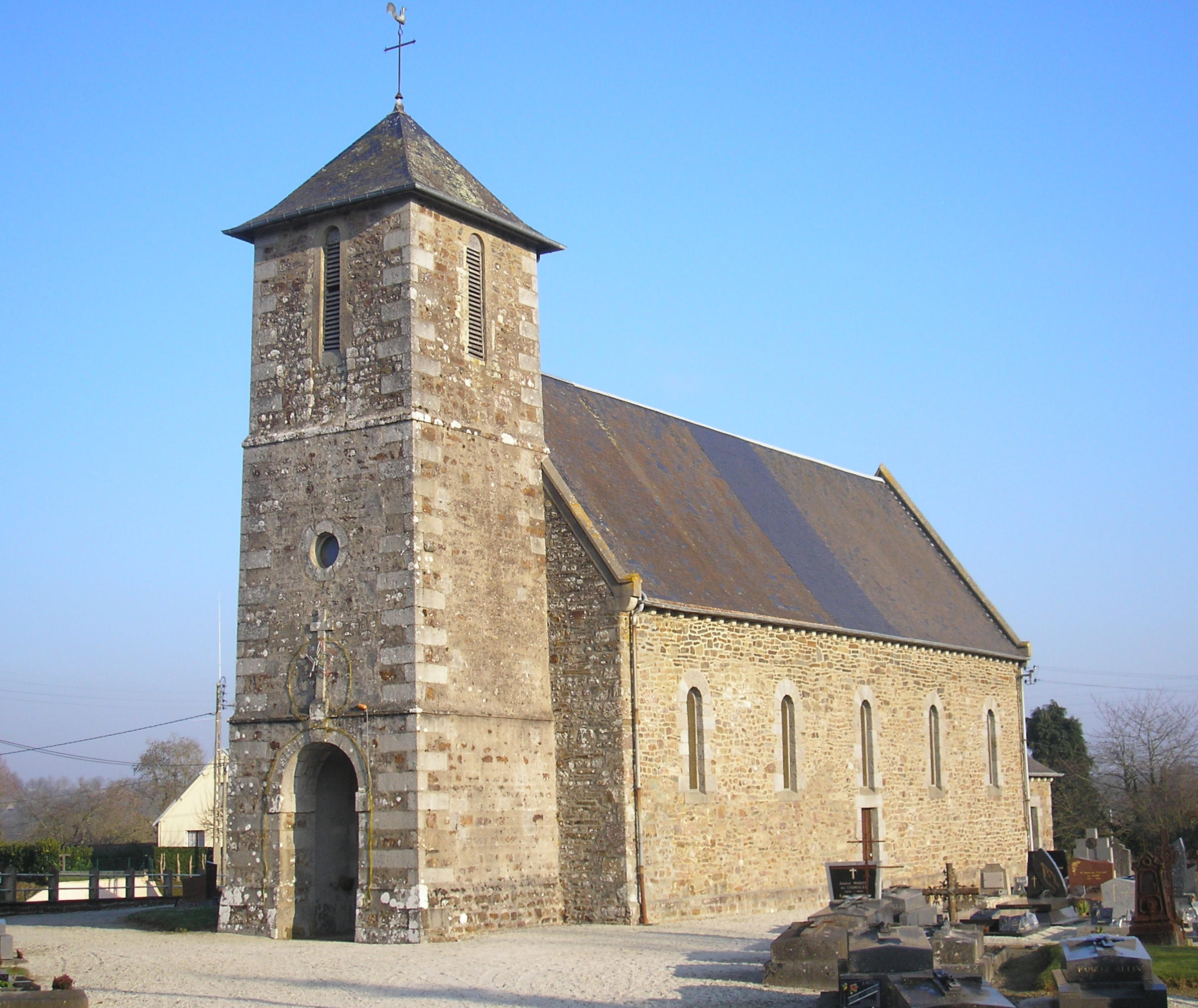 Sourdeval-les-Bois (Normandie, France). L'église Notre-Dame.